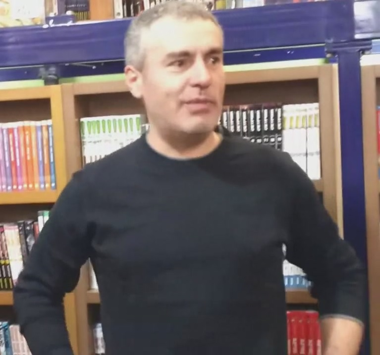 L'editor César Sánchez, de Fulgencio Pimentel